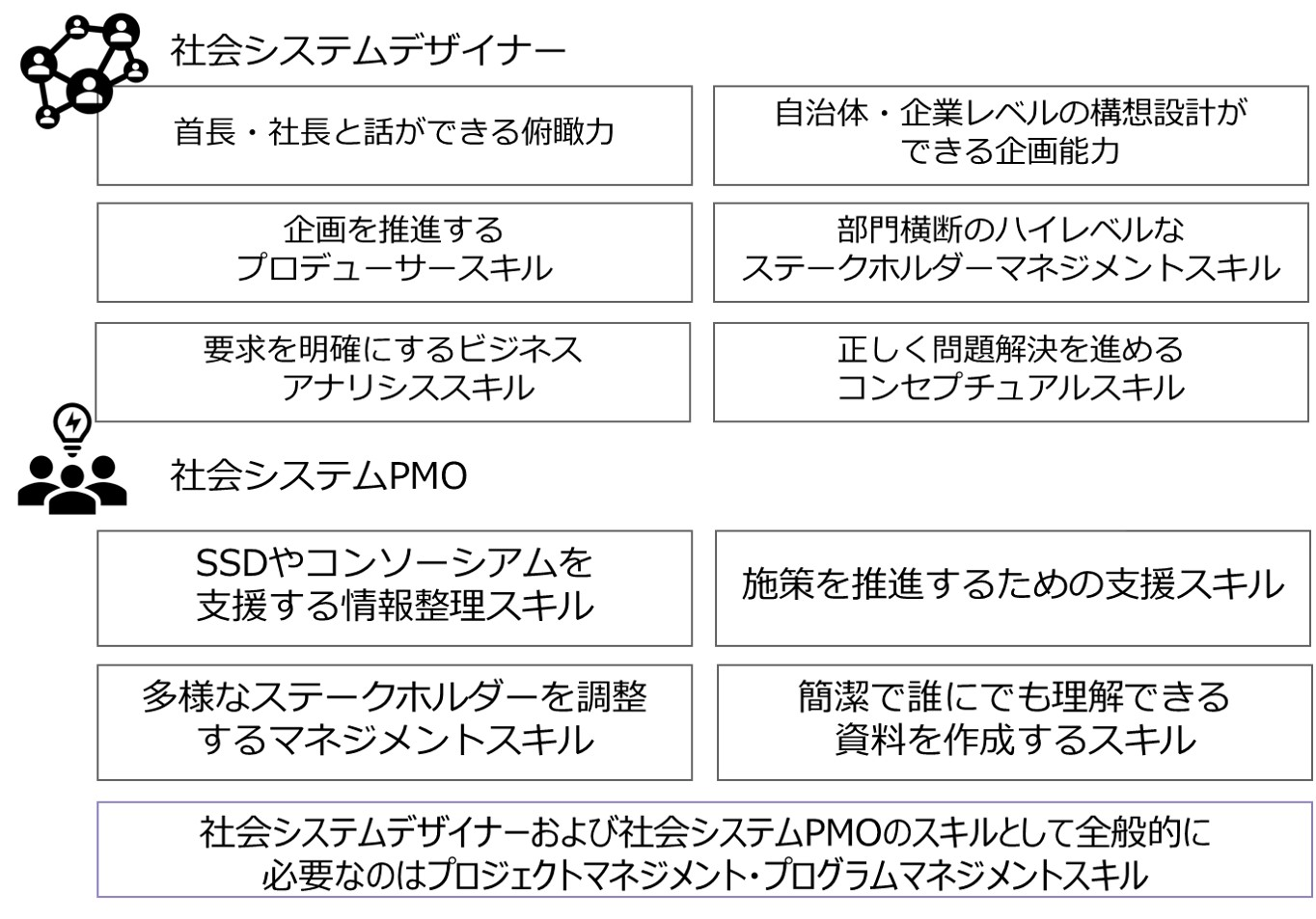 社会システムデザイナー・社会システムPMOのモデル図